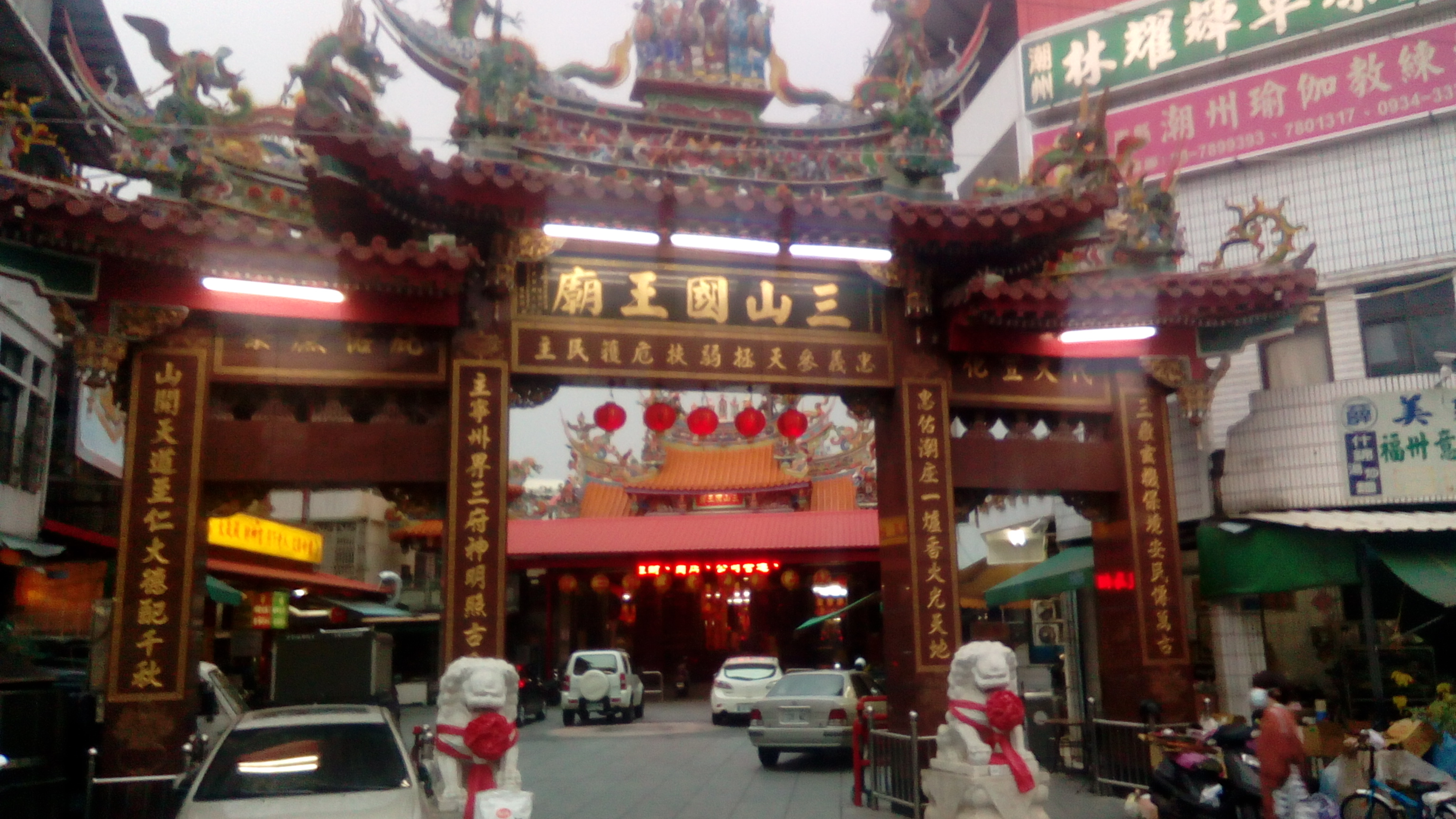 位於鬧區 圓環東南側的建基路進入 建基及西市路口右轉即可抵達